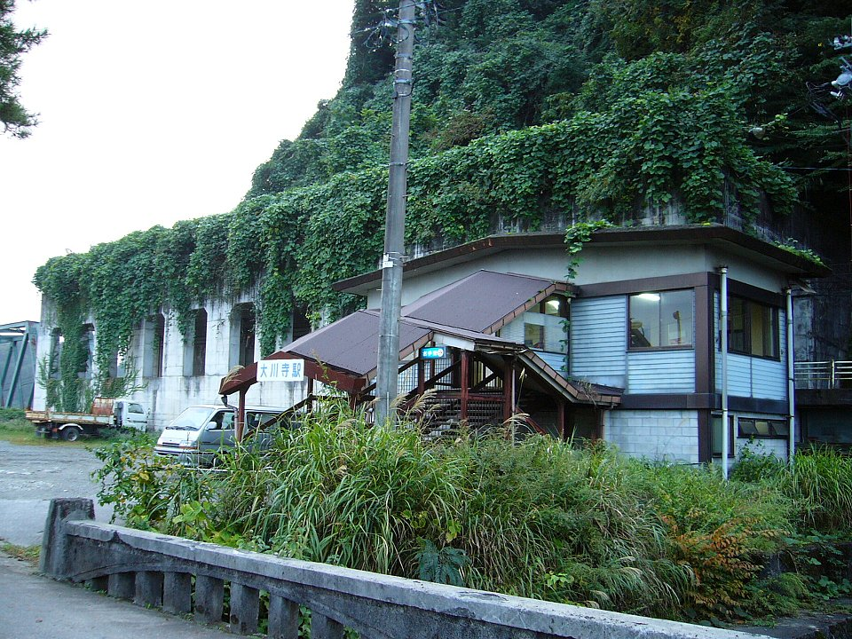 コンクリートで覆われた富山地方鉄道大川寺駅 左奥に見える鉄橋は常願寺川橋梁（上滝線） 2006年10月13日 Bakkai撮影